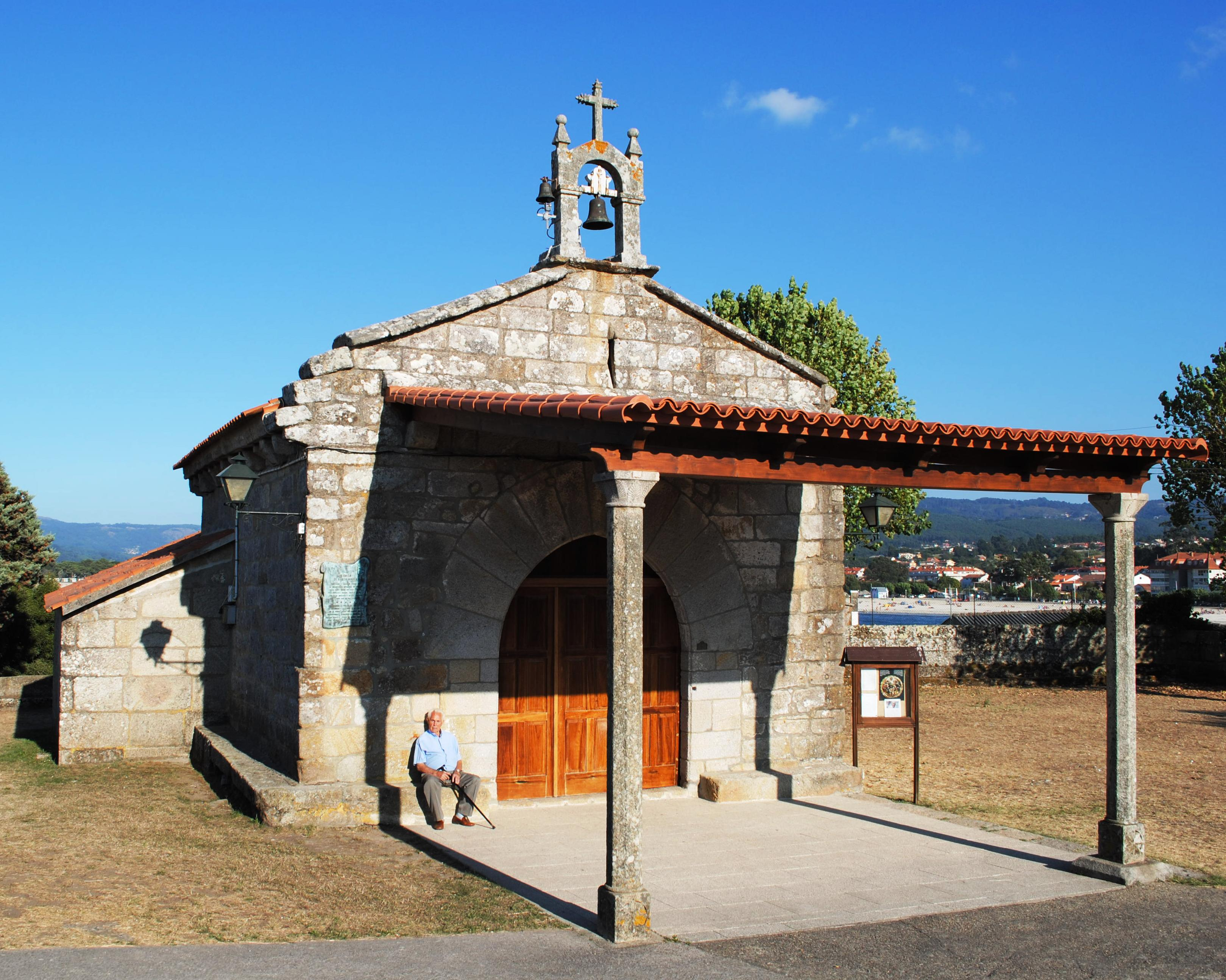 Véxase o título e as categorías